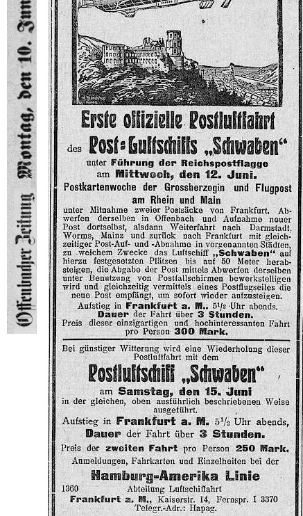 Bekanntmachung - Werbung der Postluftfahrt 1912